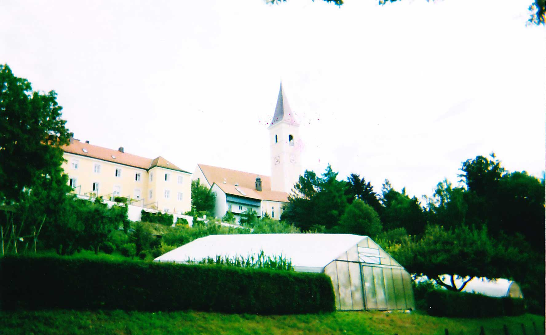 Die Pfarrkirche Dorfen mit Schwestern-Ruheheim von Südwesten